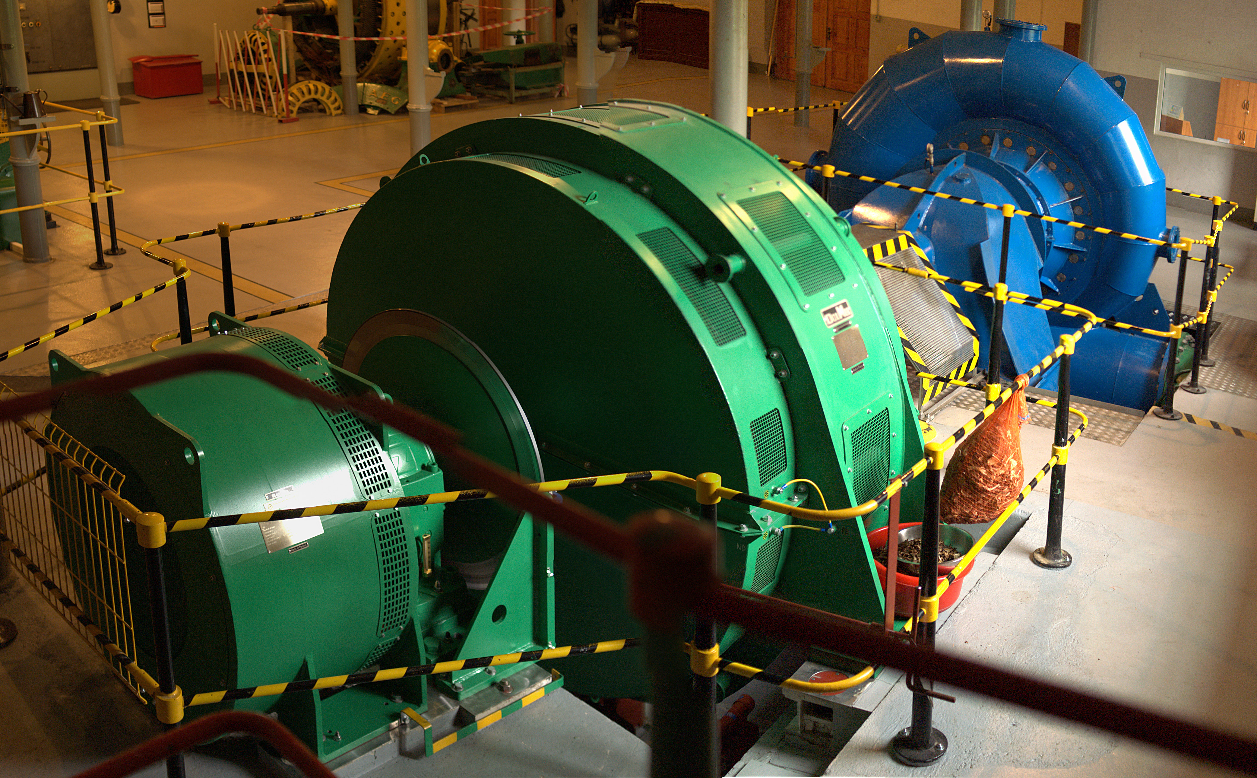 Elktrownia wodna Struga.